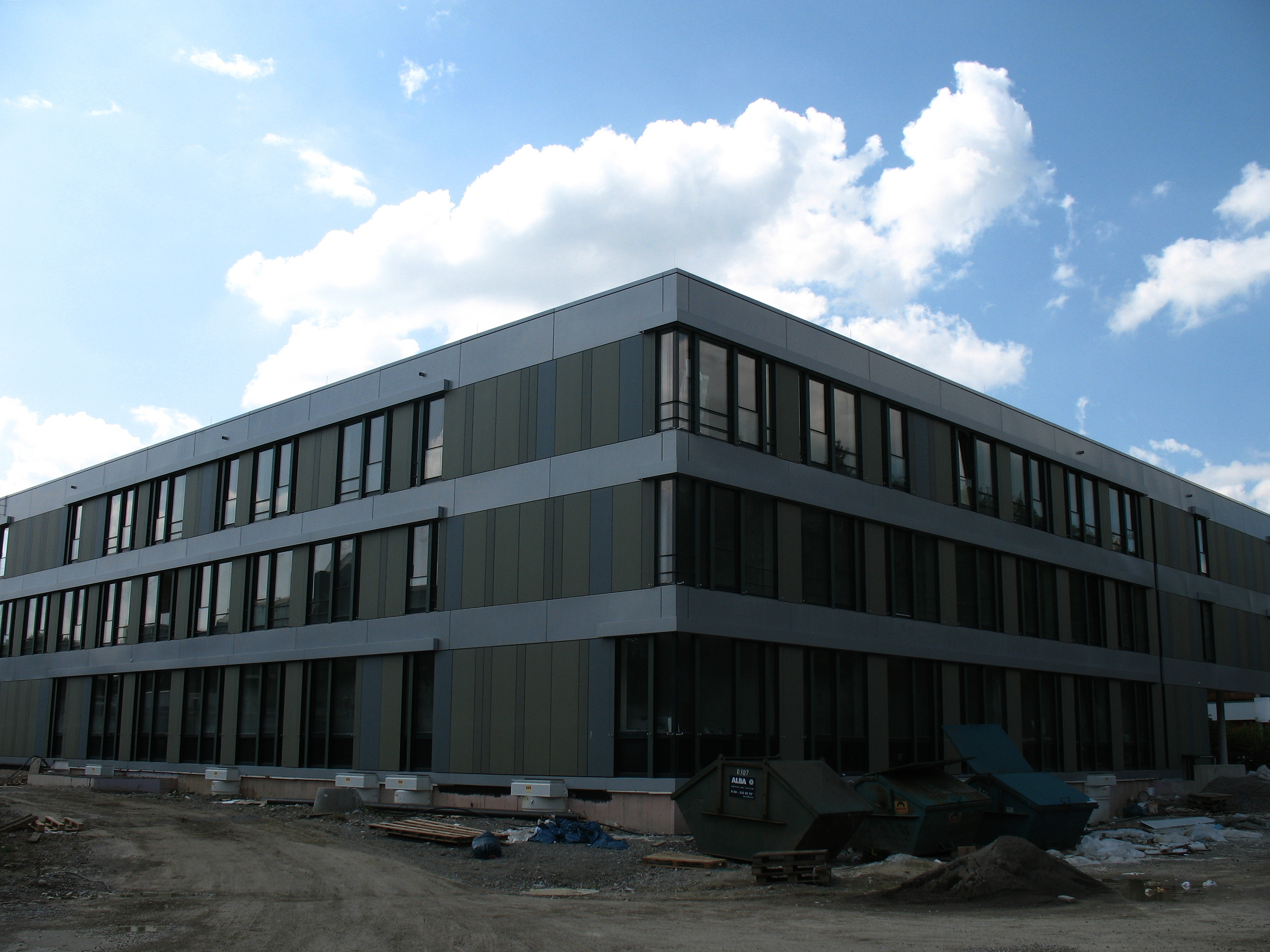 Gebäude des Mutter-Kind-Zentrums des Klinikum Friedrichshafen währrend des Baus.